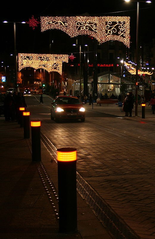 Nuevo semáforo de la Puerta del Sol - bolardos inteligentes e iluminados. Based on CC ShareAlike from File:Nuevo_semáforo_de_la_Puerta_del_Sol_-_bolardos_inteligentes.jpg